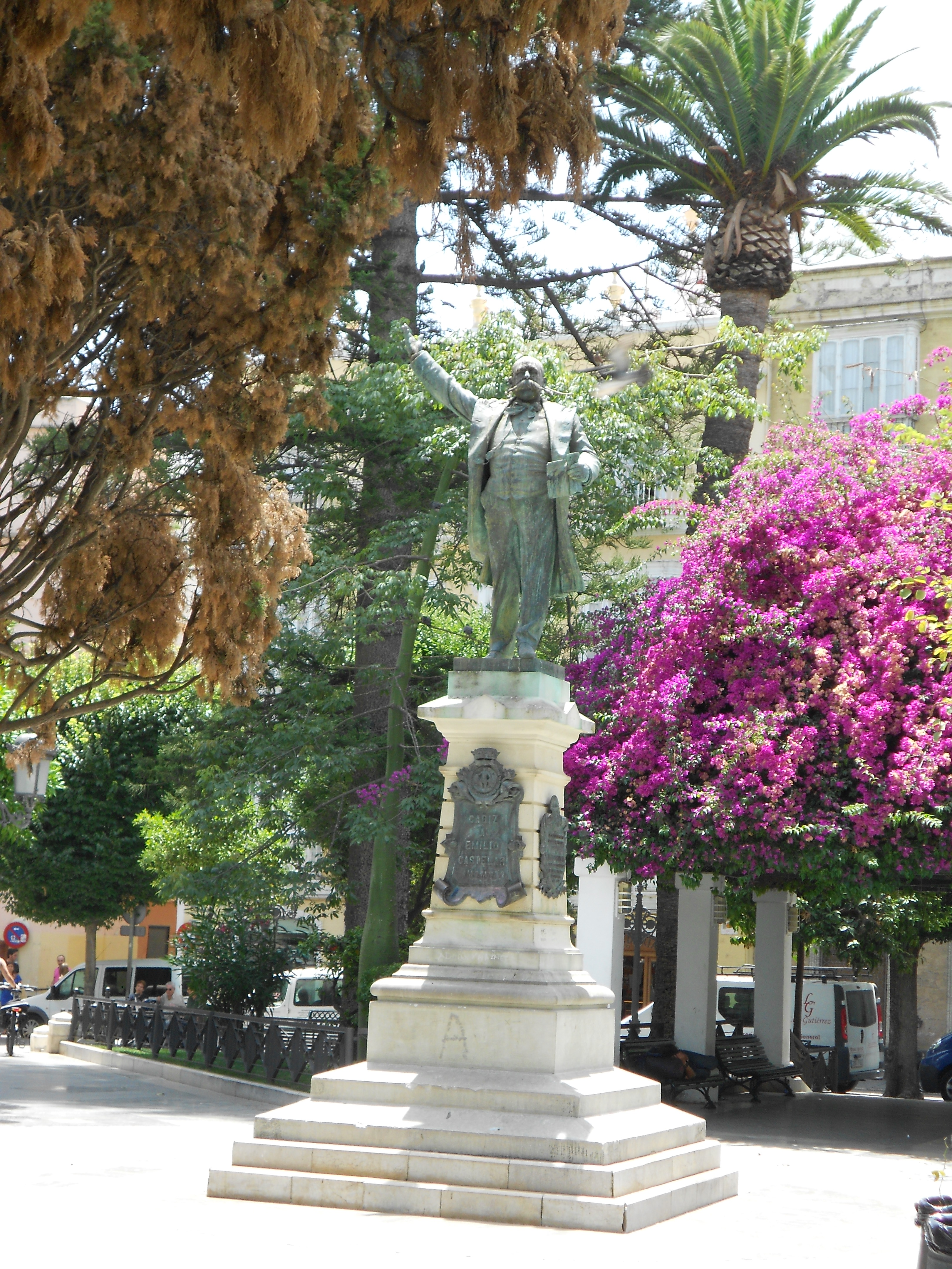 Denkmal Emilio Castelar auf der Plaza de Candelaria, Cadiz